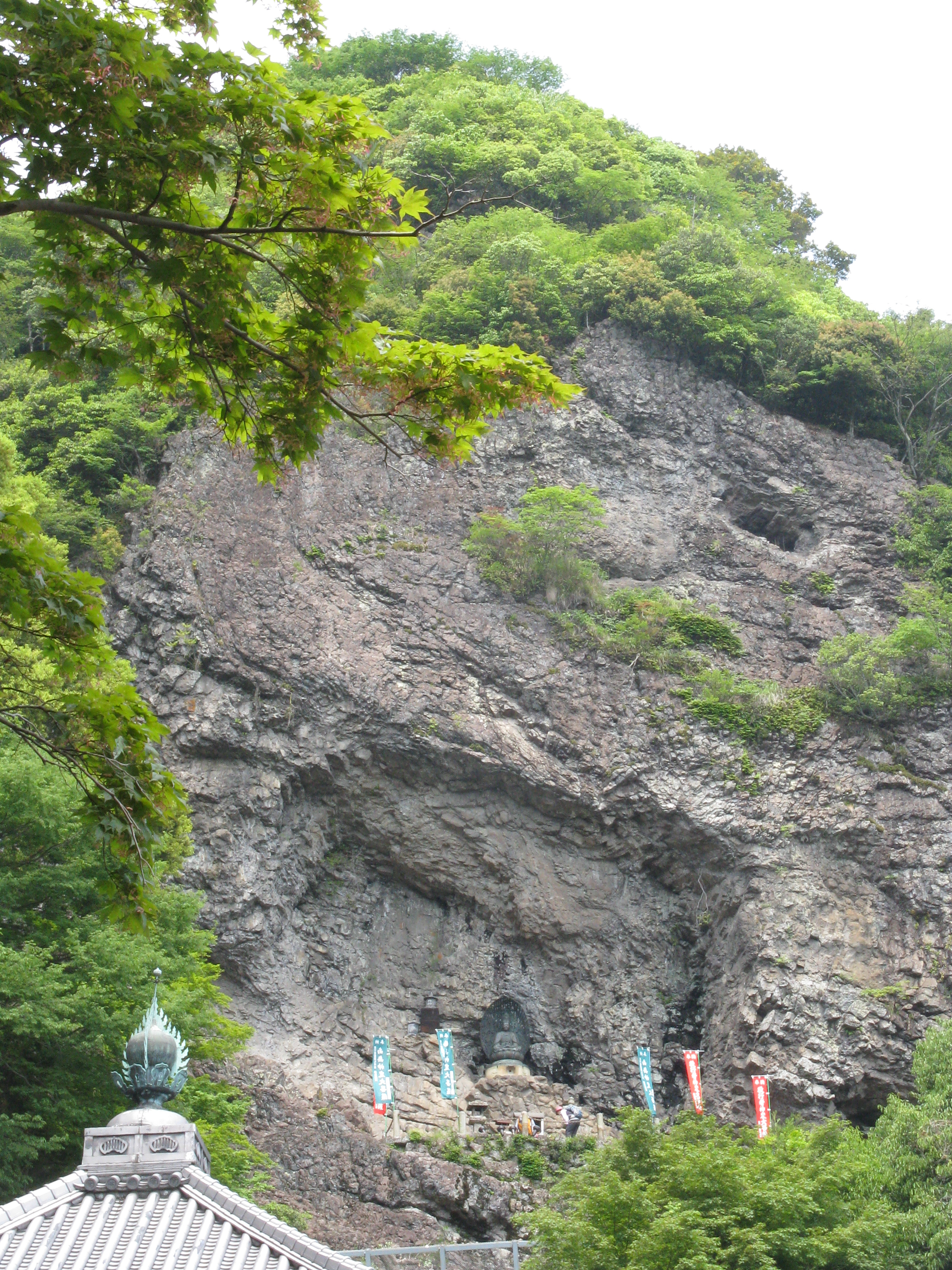 宝山寺 般若窟